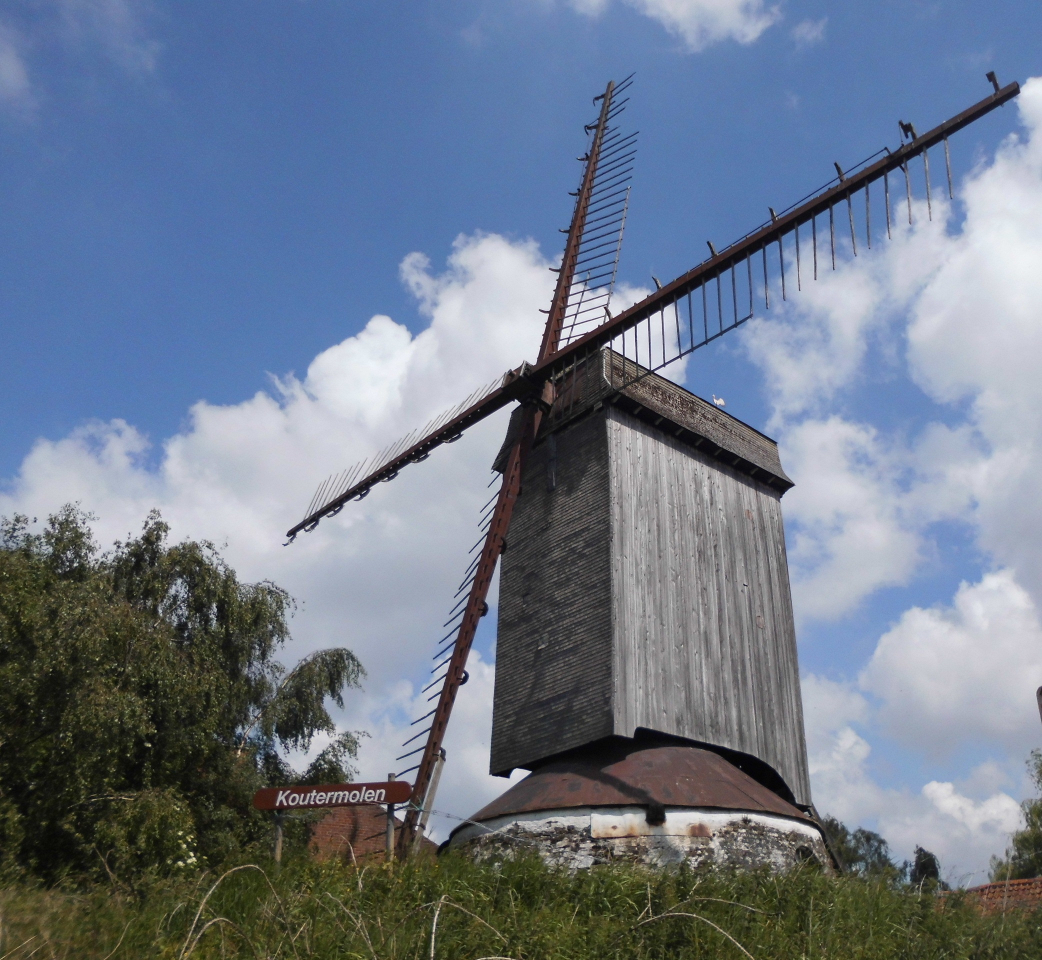 Koutermolen - Koutermolenstraat - Kortemark - West-Vlaanderen - België